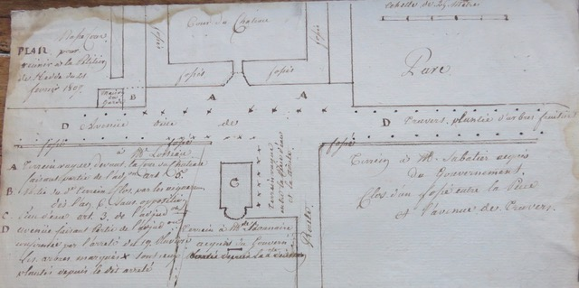 Plan du devant du château de Tresneau pour réunir à la Pétition de Hedde du 11 février 1897 consécutive à la vente de biens nationaux